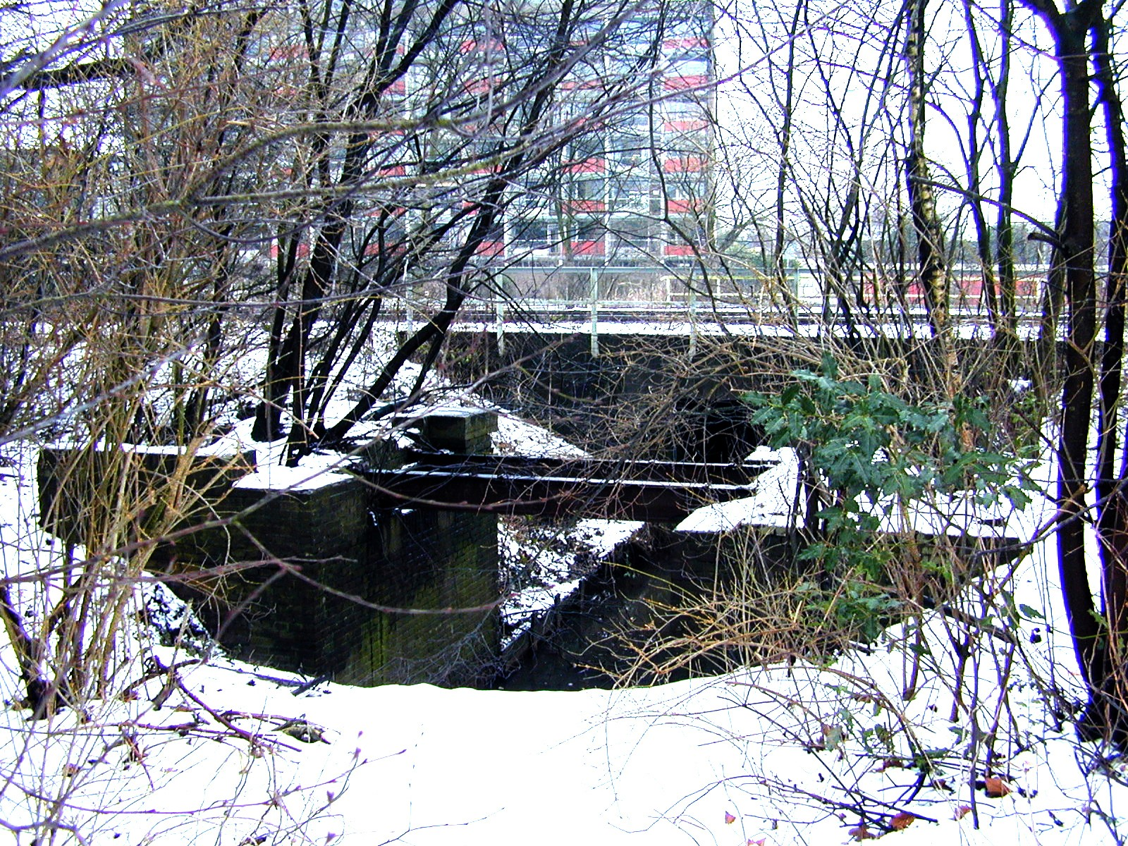 Restanten van de spoorbrug van de Eerste Drentsche Stoomtramweg-Maatschappij (EDS) op de voorgrond te Assen. NS spoorlijn op de achtergrond.